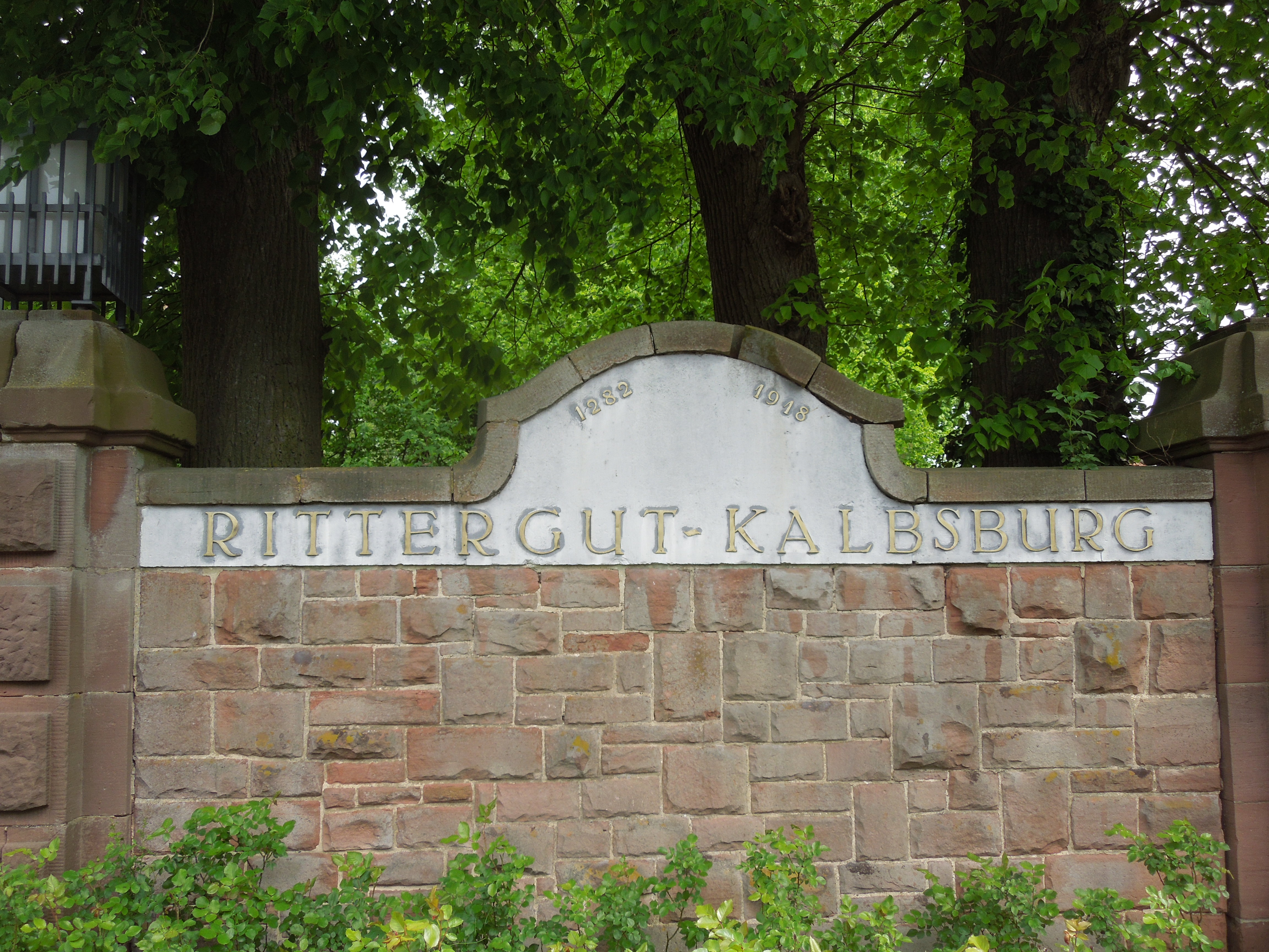 Kalbsburg: Beschriftung an der Einfahrt zum ehem. Rittergut